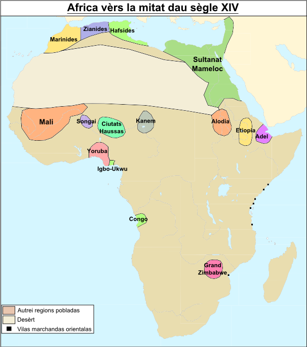 Carta politica d'Africa vèrs la mitat dau sègle XIV.